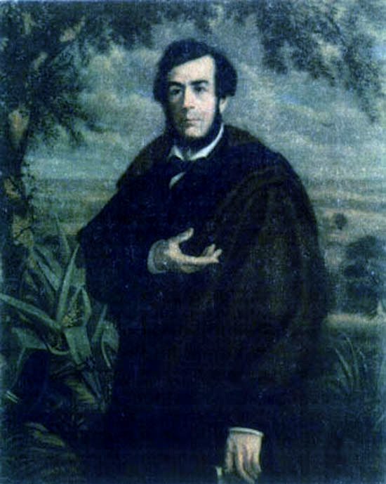 Retrato del escritor argentino Esteban Echeverría